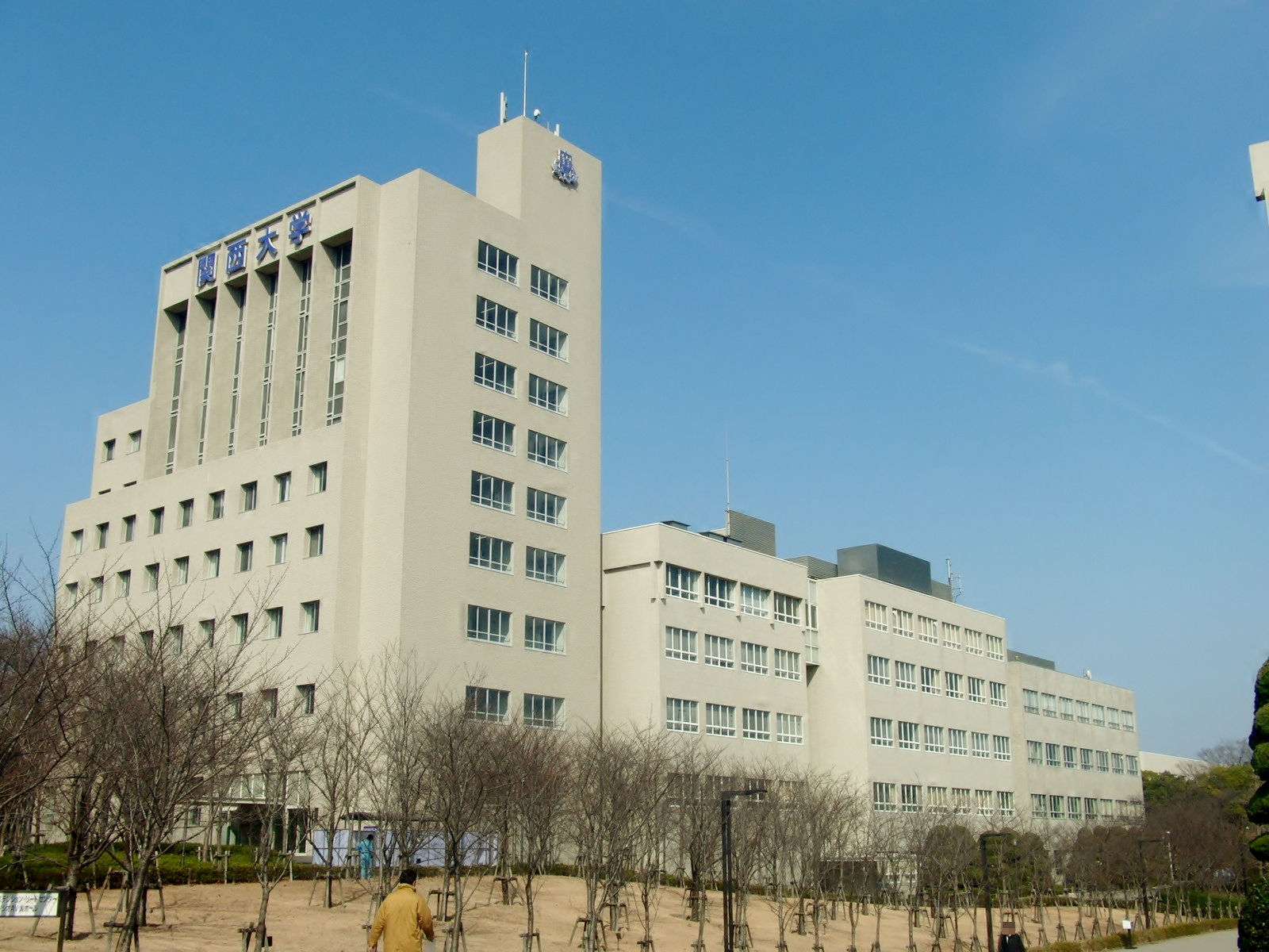 関西大学第3学舎を撮影